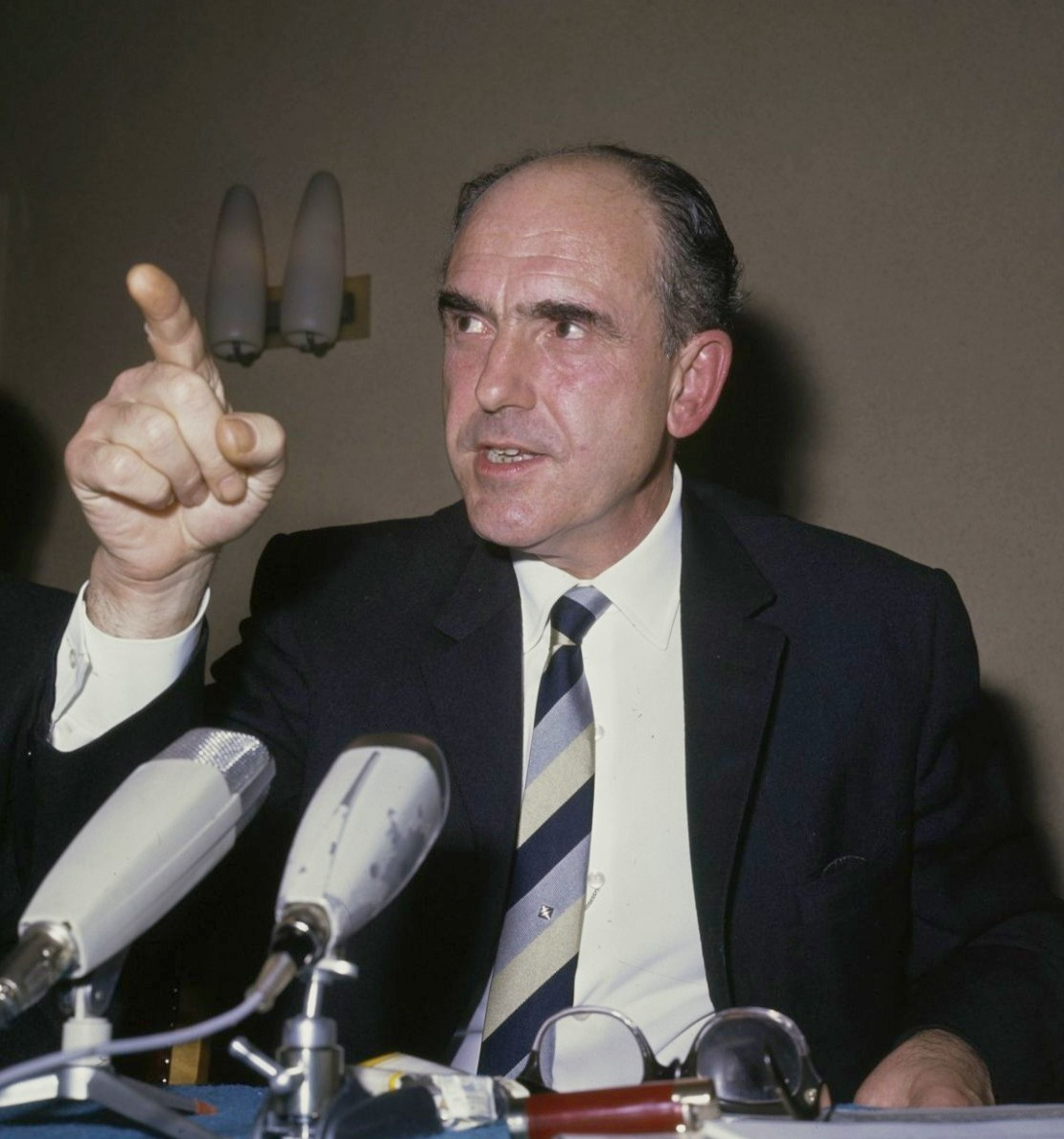 Andreas Papandreon (Griekenland) houdt persconferentie in Poort van Cleve , Amsterdam